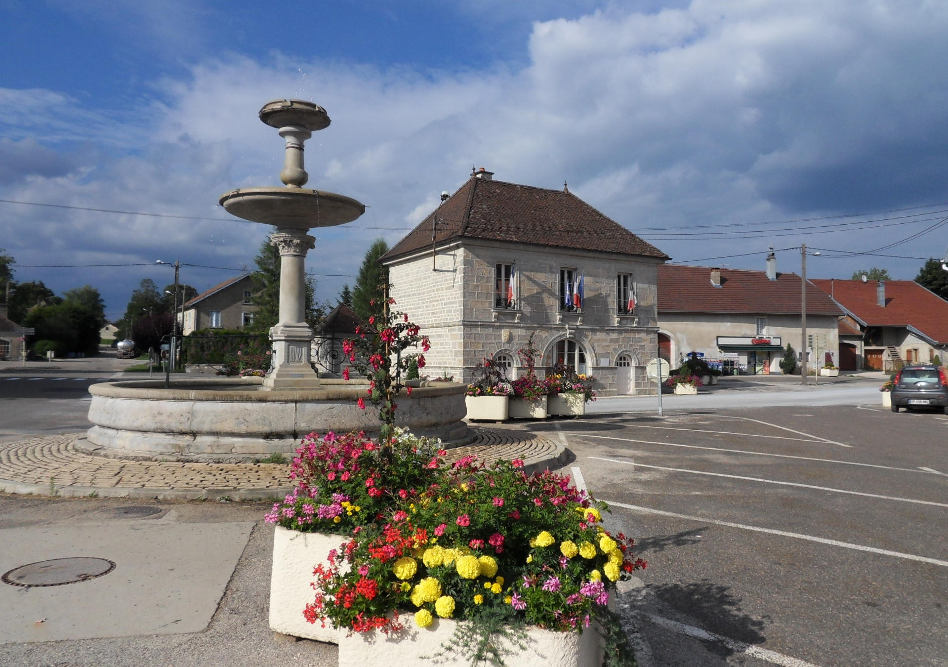 Andelot-en-Montagne Andelot-en-Montagne Département du Jura, Franche-Comté, FRANCE